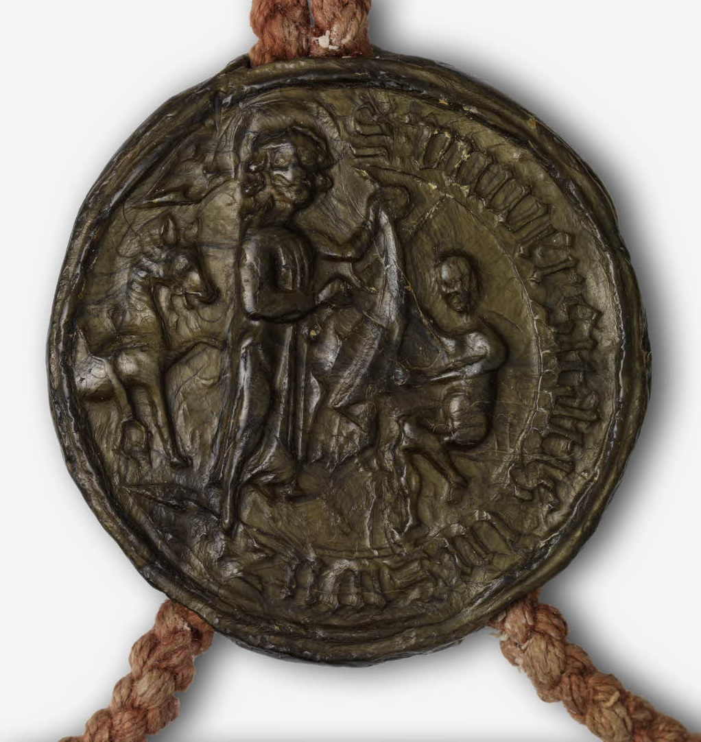 Sceau du canton de Schwyz, appendu au traité de Fribourg